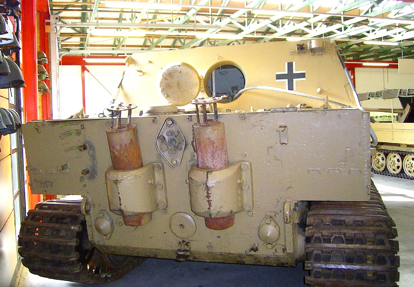 Rückseite des Sturmtigers im Deutschen Panzermuseum Munster.